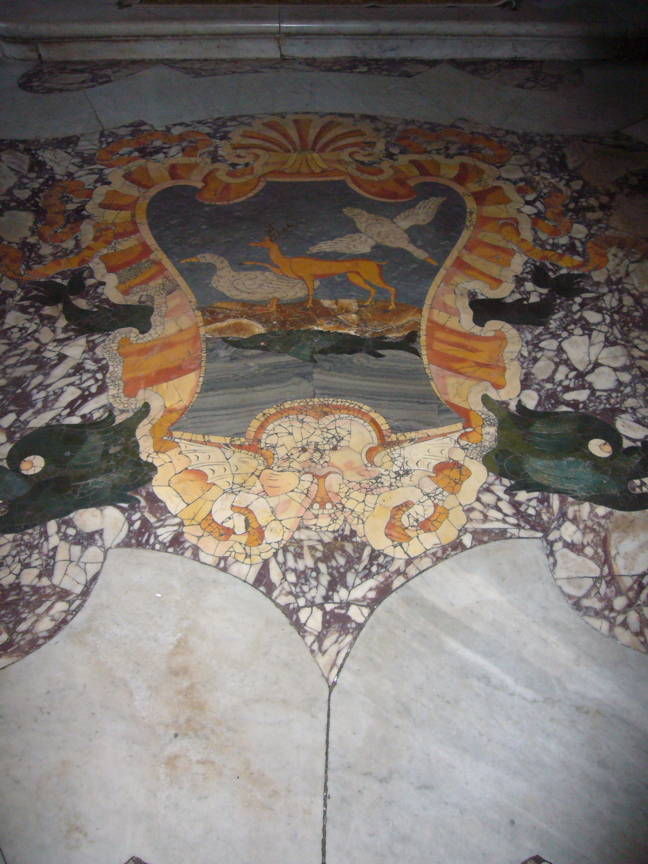 Roma, sant'Angelo in Pescheria: stemma dell'Università dei pescivendoli nella cappella di sant'Andrea